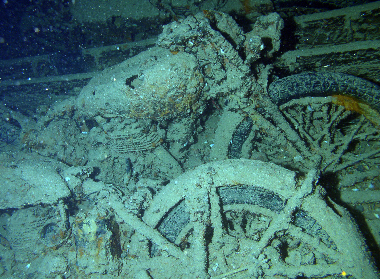 Motos en el SS Thistlegorm